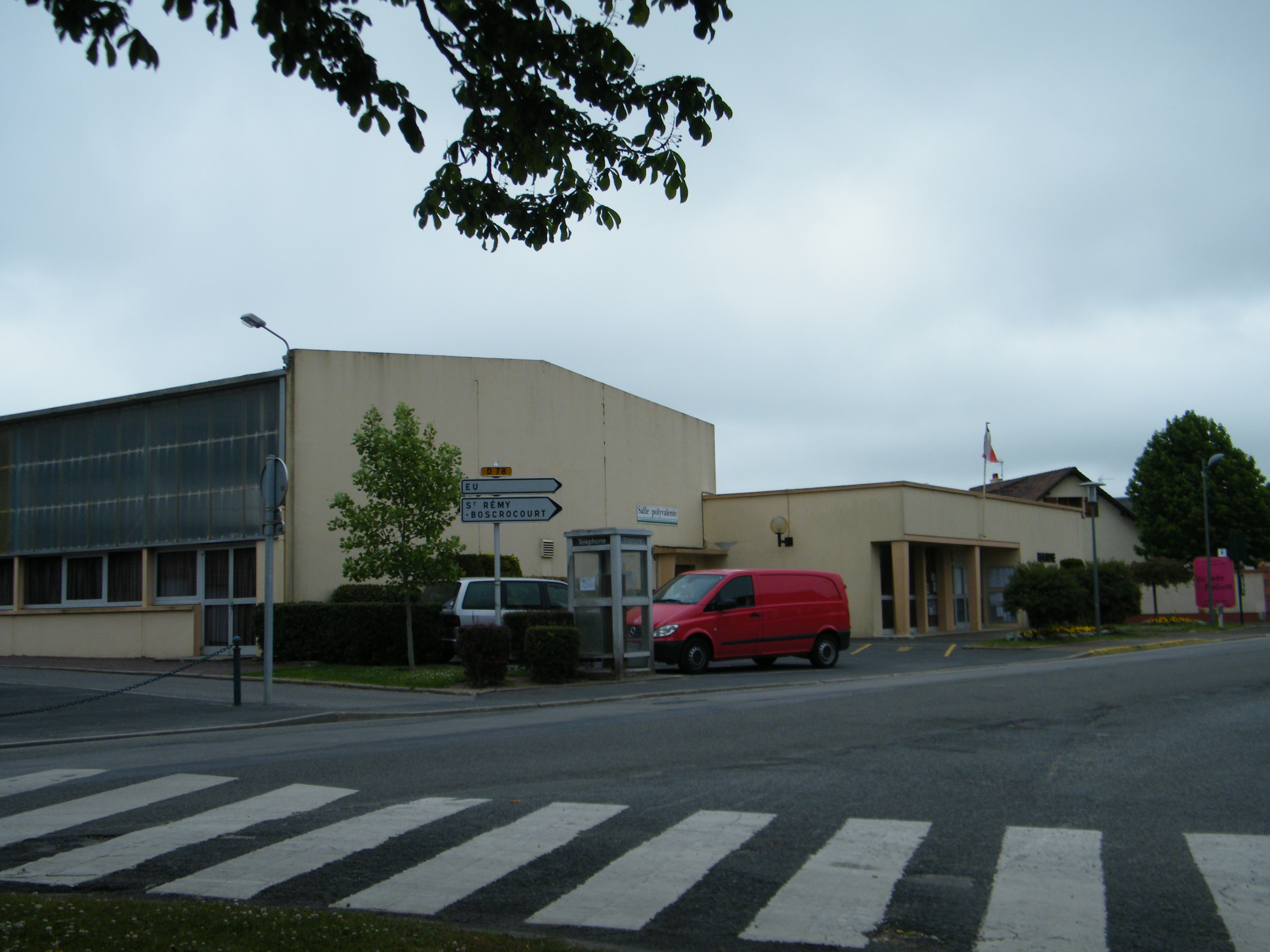 Mairie salle Etalondes (Seine-Maritime) France